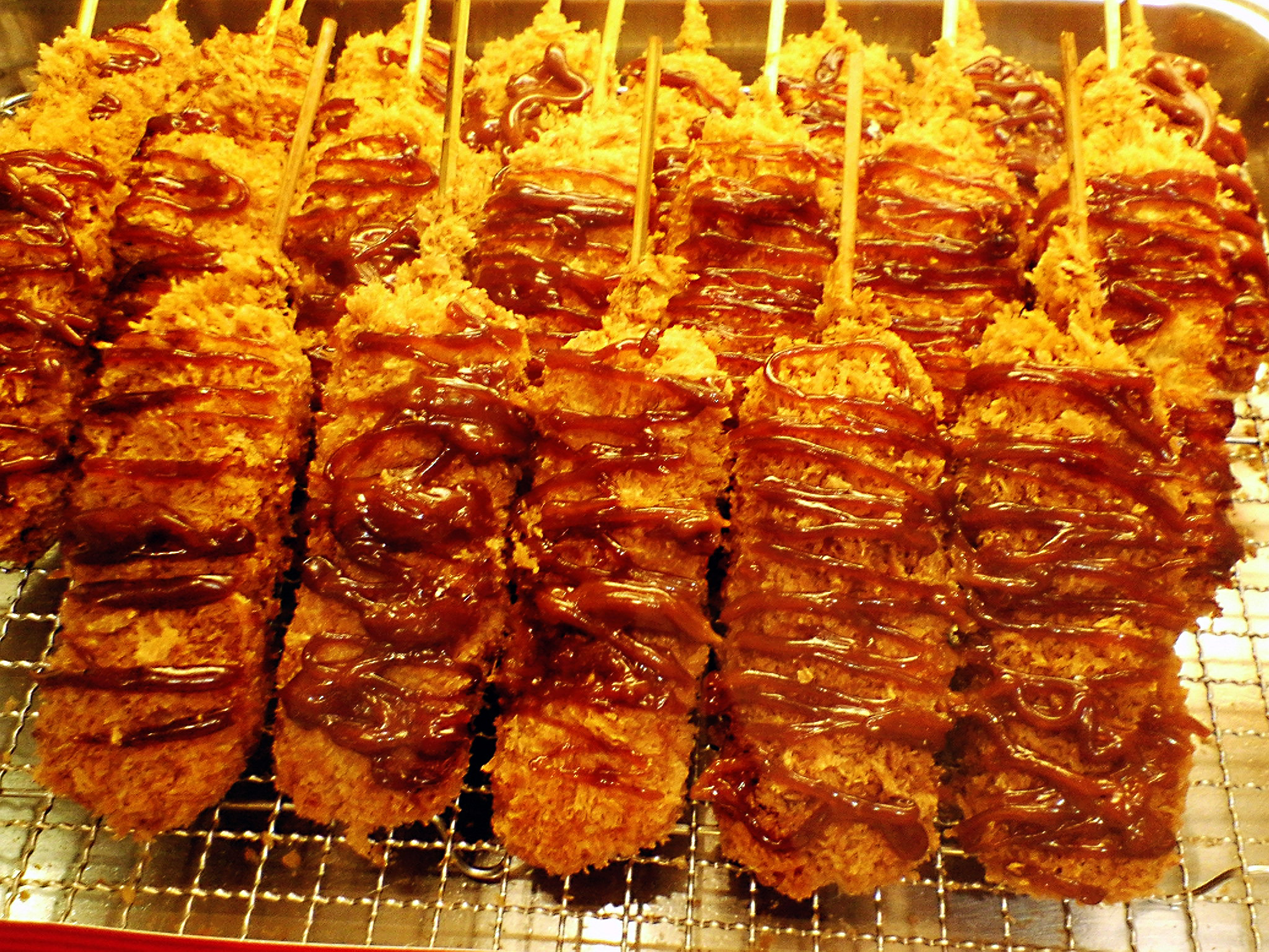 味噌カツ